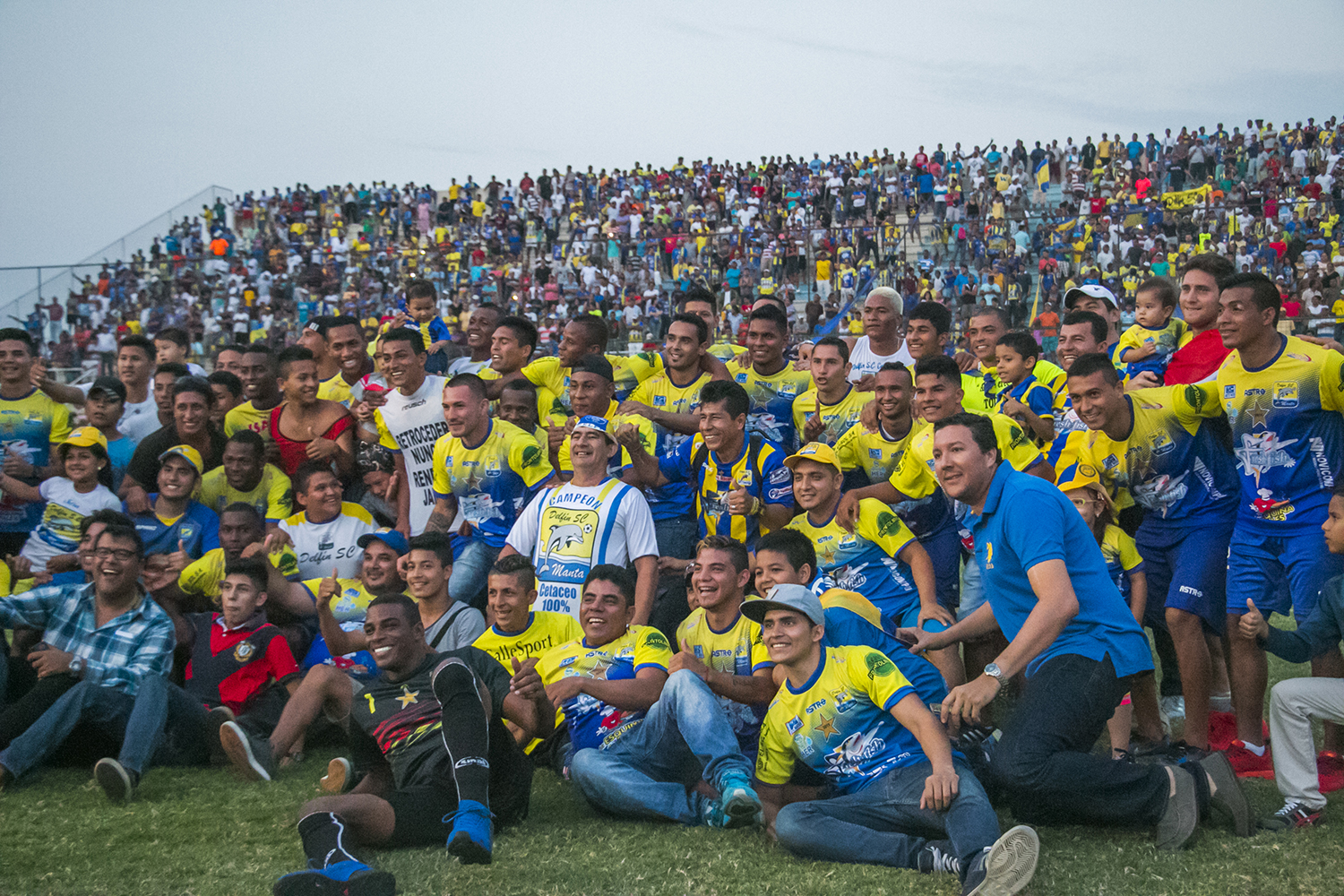 Delfín Sporting Club de Manta Campeón de la Serie B de 2015